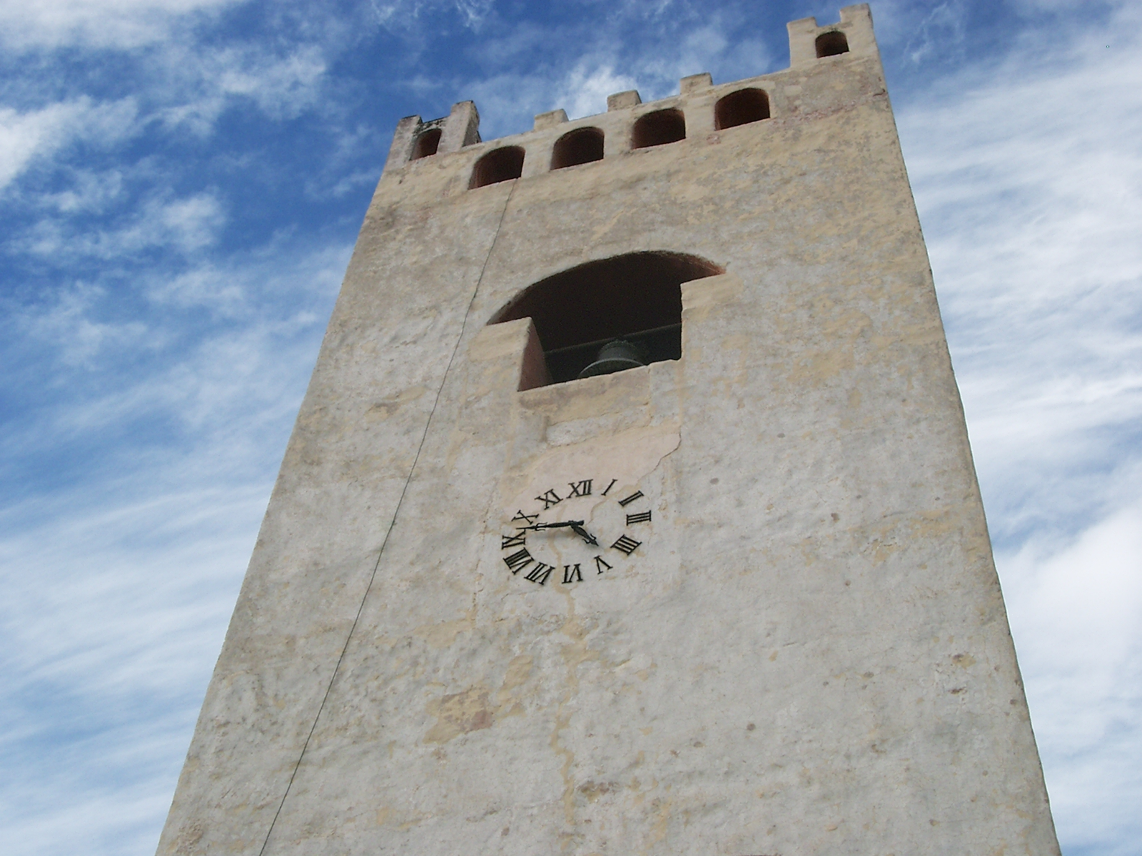 Torre románica de Actopan, Hidalgo. (Úsala con su respectivo crédito)